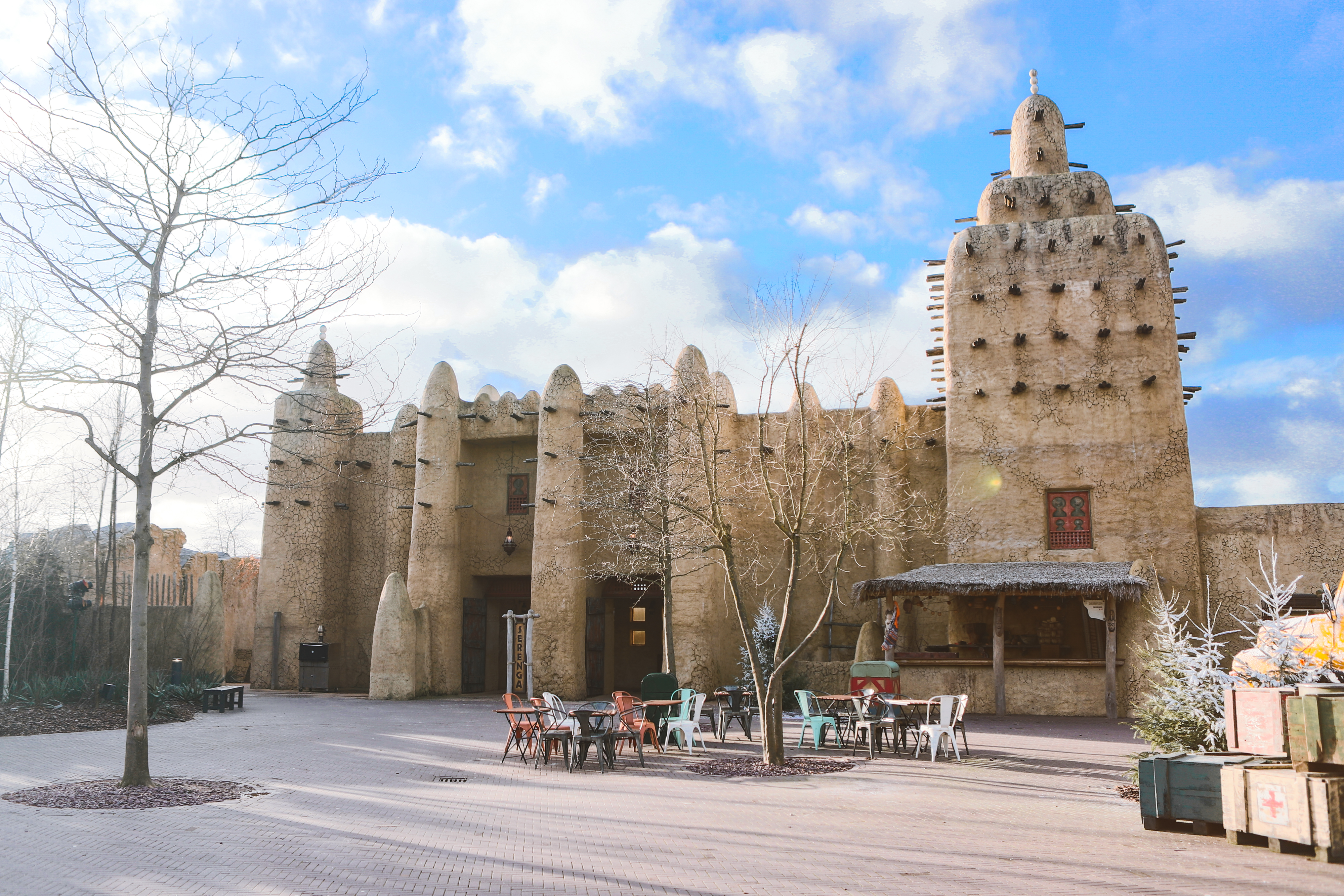 Wildlands Adventure Zoo in Emmen (2019)